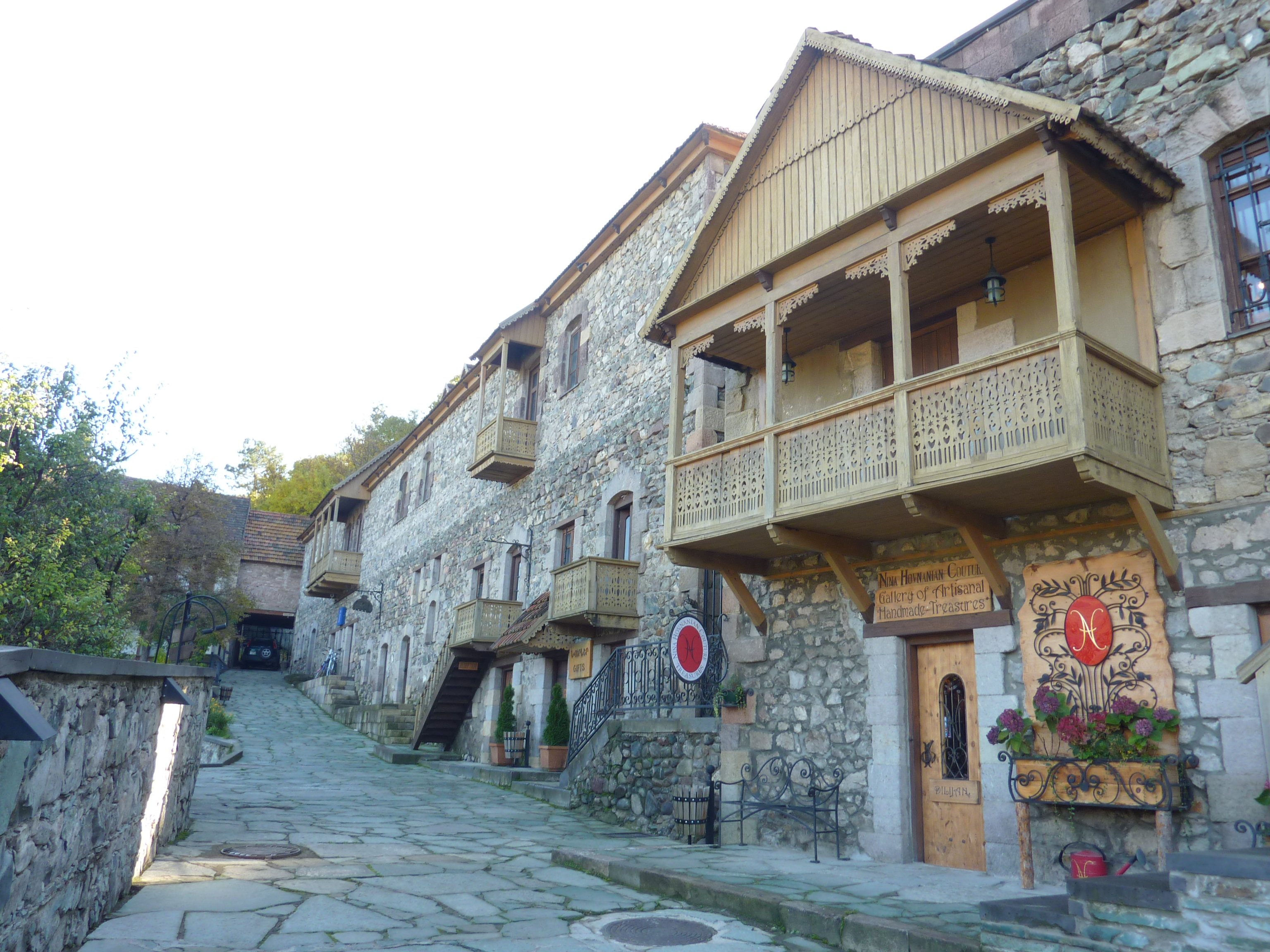 Dilidjan: habitat traditionnel du XIXe reconstitué dans le cadre d'un centre commercial pour touristes